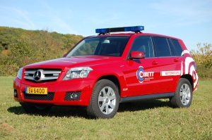 Den KDOW 1